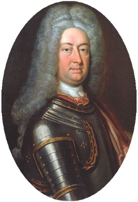 Der letzte männliche Vertreter des Geschlechtes, Schatzrat Gebhard Werner von Bartensleben, verstorben 1742